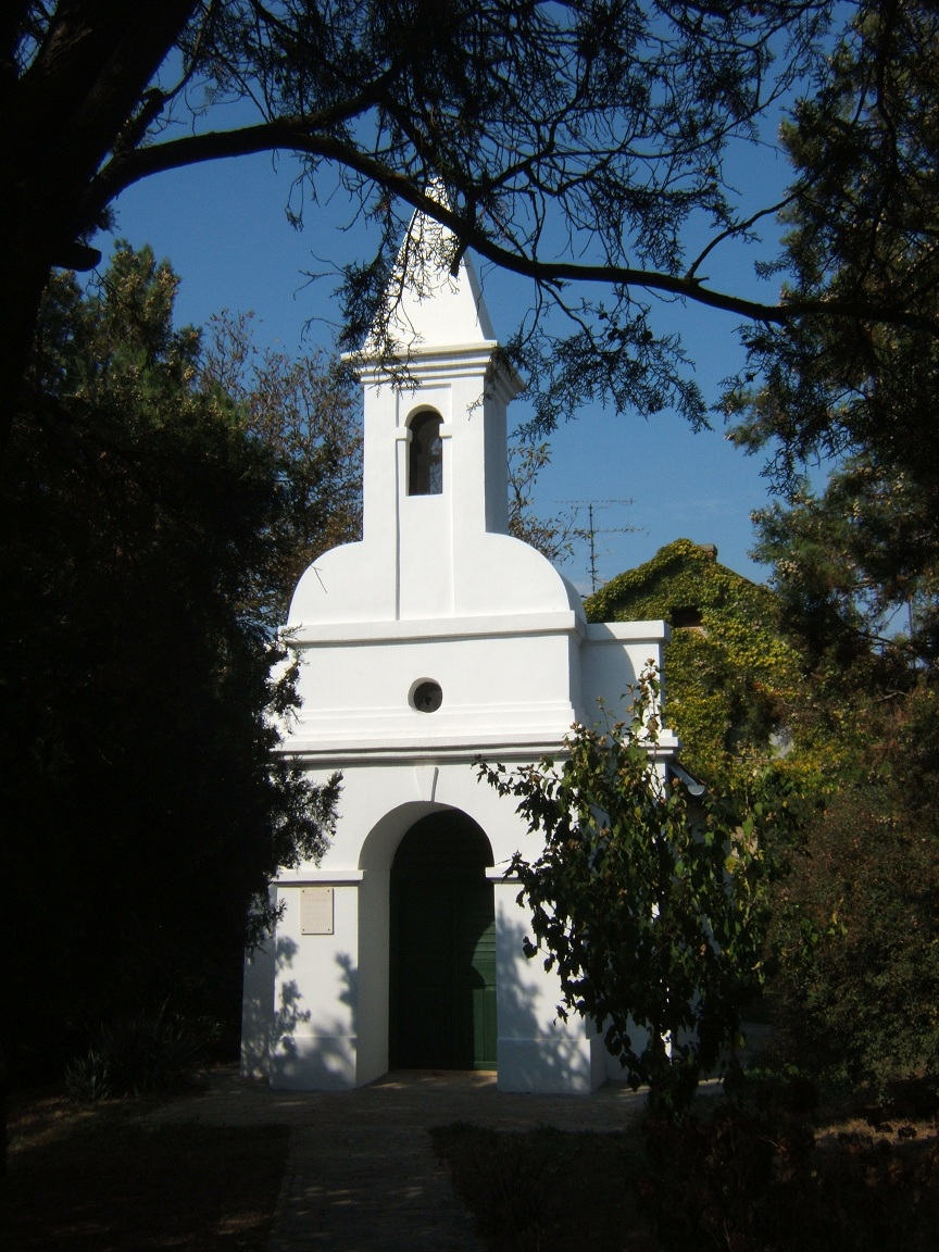 Kaposvár, kaposhegyi kápolna, 18. századi műemlék